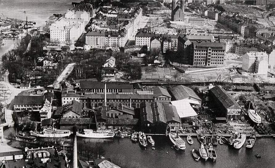 Bergsunds Mekaniska Verkstad på 1920-talet fotografiet senast kan ha ta skapats 1929, då byggnaderna revs, och fotografen är okänd